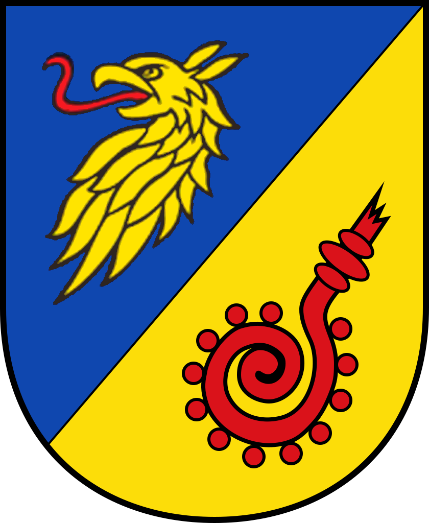 Durch den Innenminister von Mecklenburg-Vorpommern genehmigt ????. Flaggenbeschreibung „Die Flagge der Gemeinde Kritzmow ist gleichmäßig vom Liek unten zum oberen Flugsaum schräggeteilt von Blau und Gelb. Die Schrägstreifen sind jeweils mit den Figuren des Gemeindewappens in flaggengerechter Tingierung belegt: der blaue Schrägstreifen mit einem abgerissenen, rot gezungten goldenen Greifenkopf, der gelbe Schrägstreifen mit einem schrägrechts liegenden, gestürzten roten Abtstab mit abgebrochenem Schaft. Die Figuren nehmen je 2/3 der Höhe des Flaggentuchs ein, wobei sie mittig 1/10 nach oben bzw. nach unten verschoben sind. Die Höhe des Flaggentuchs verhält sich zur Länge wie 2 zu 3.“[1]